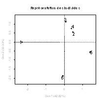 AFM. Données test. Représentation des individus sur le premier plan issu de l’AFM